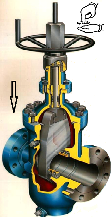 این تصویر آموزشی جهت نشان دادن حرکت خطی شیرآلات تهیه گردیده است.